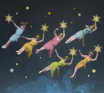 Image du film A la conquête du pôle (1912) de George Méliès